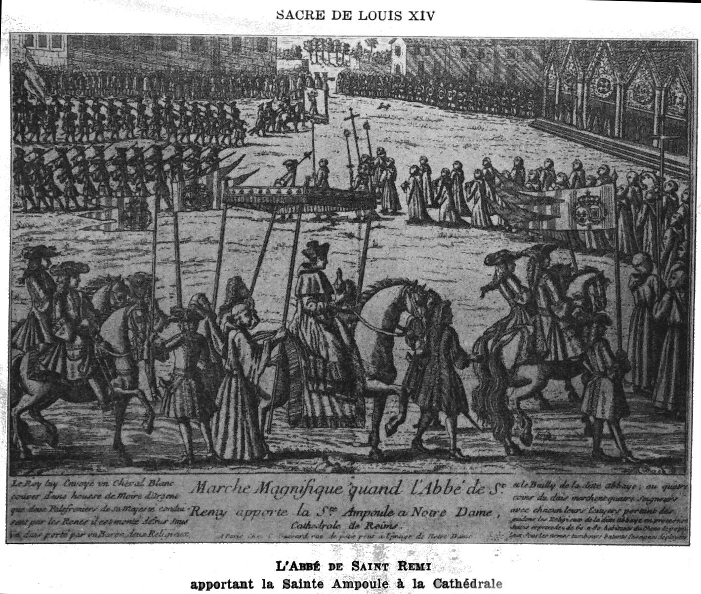 issu du fonds de la B.M. de Reims.